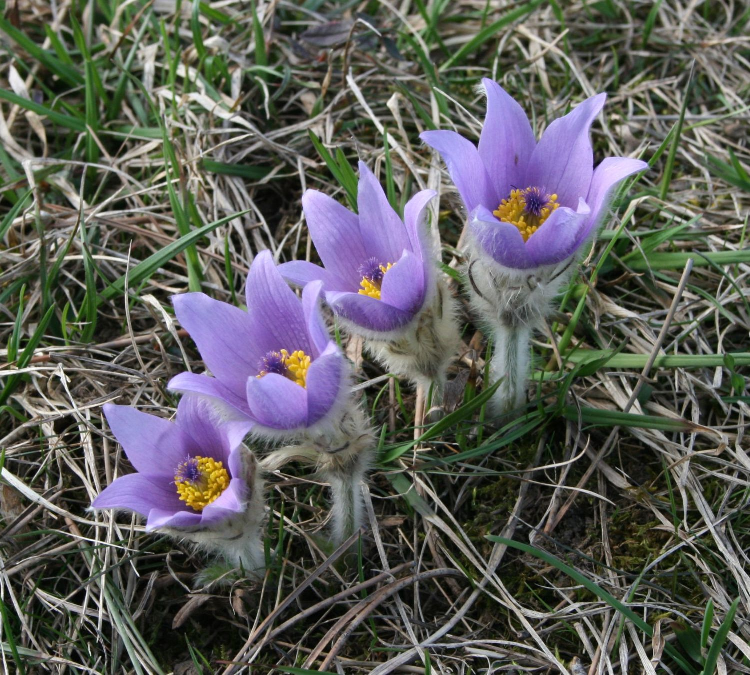 Pulsatilla grandis, Hahnenfußgewächse (Ranunculaceae) - - Österreich/Austria/Autriche: Niederösterreich, Wienerwald, W Gießhübl